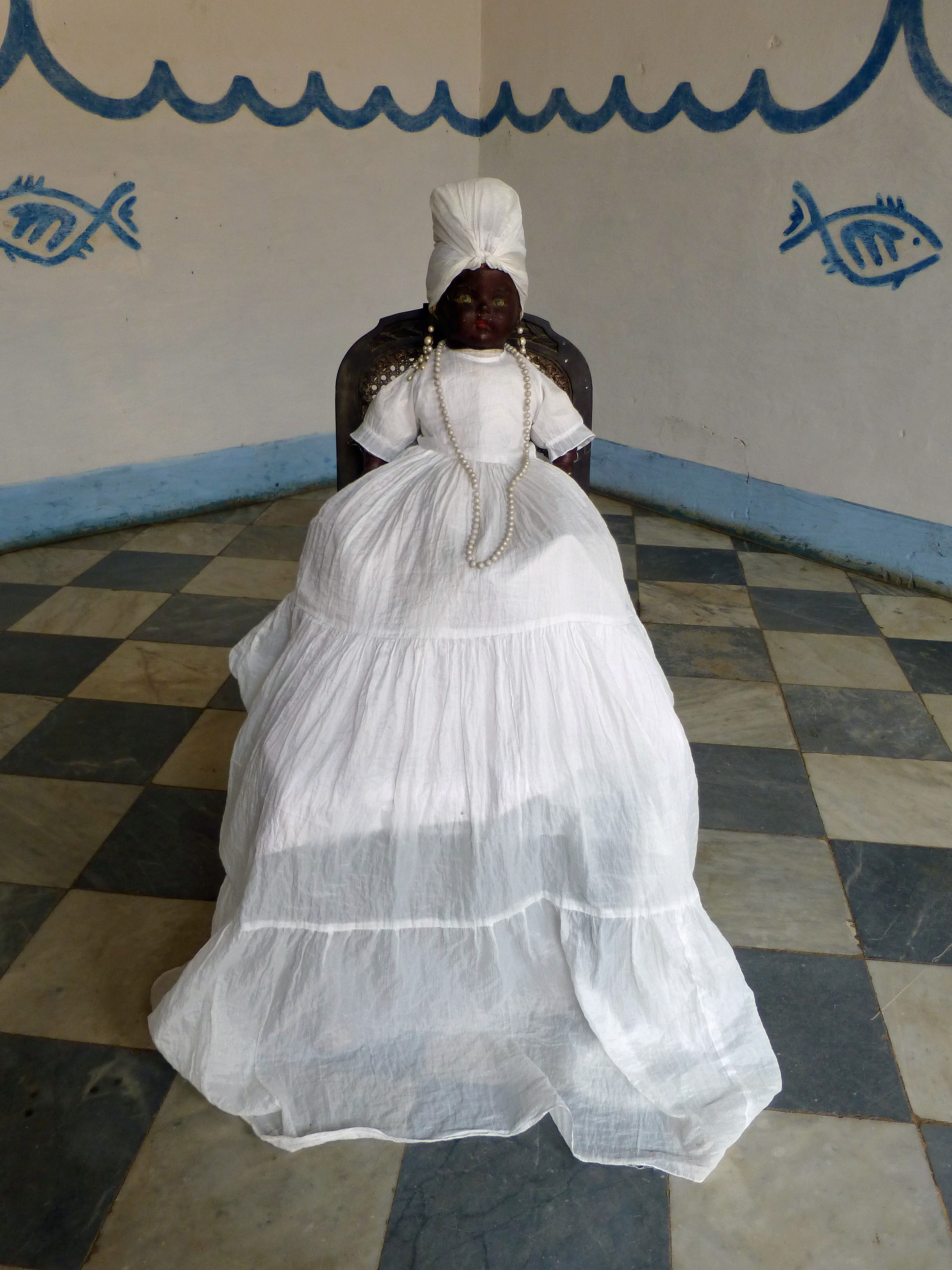 Santería à Trinidad (Cuba) : Templo Yemalla (Yemayá)